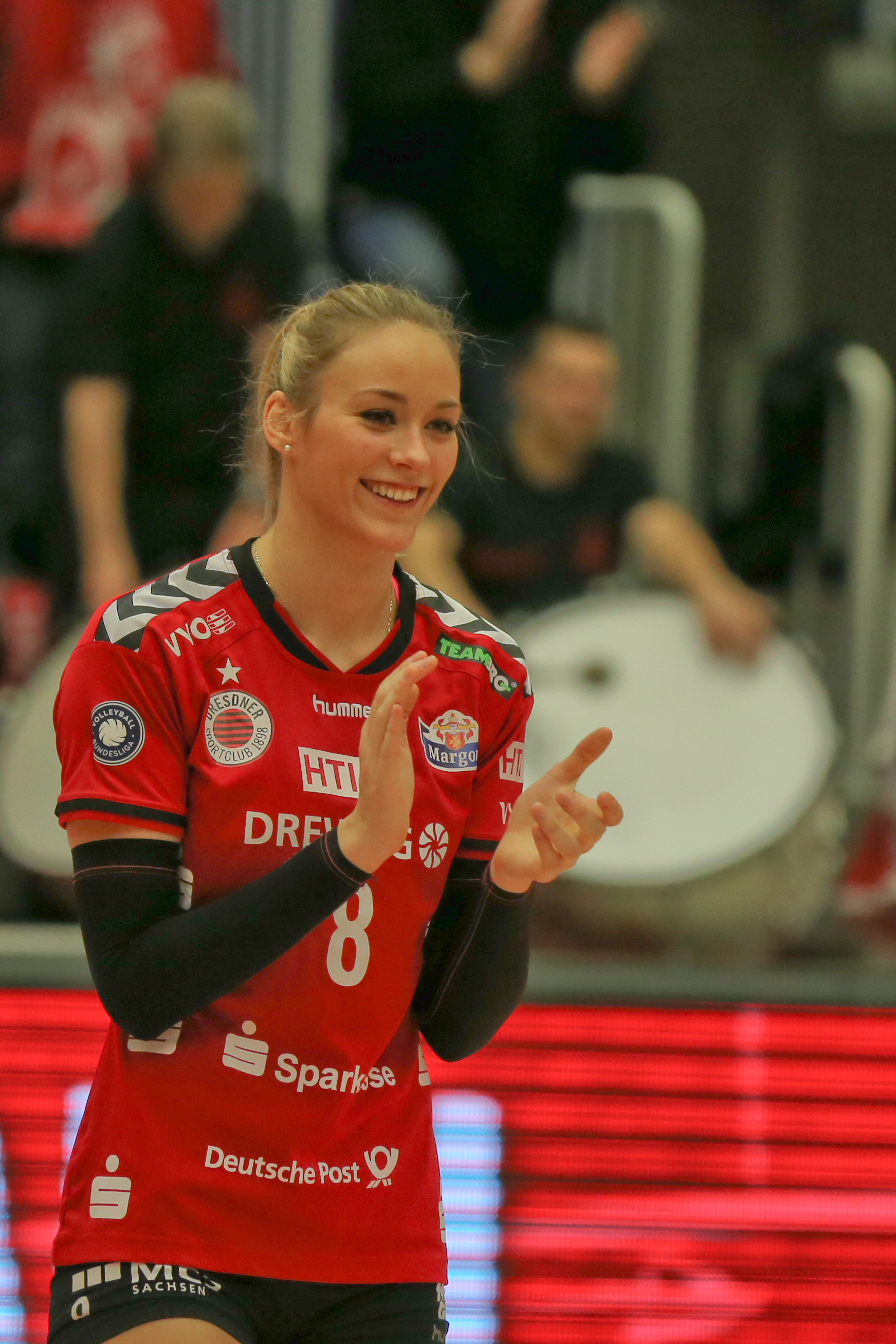 Volleyballspiel in der 1. Bundesliga des Dresdner SC gegen Aurubis Hamburg in der Margon Arena in Dresden.